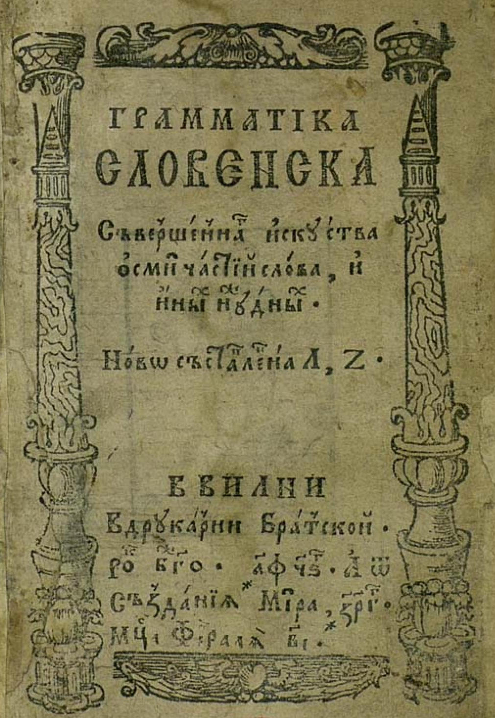 Grammatica slovenska printed in Vilna